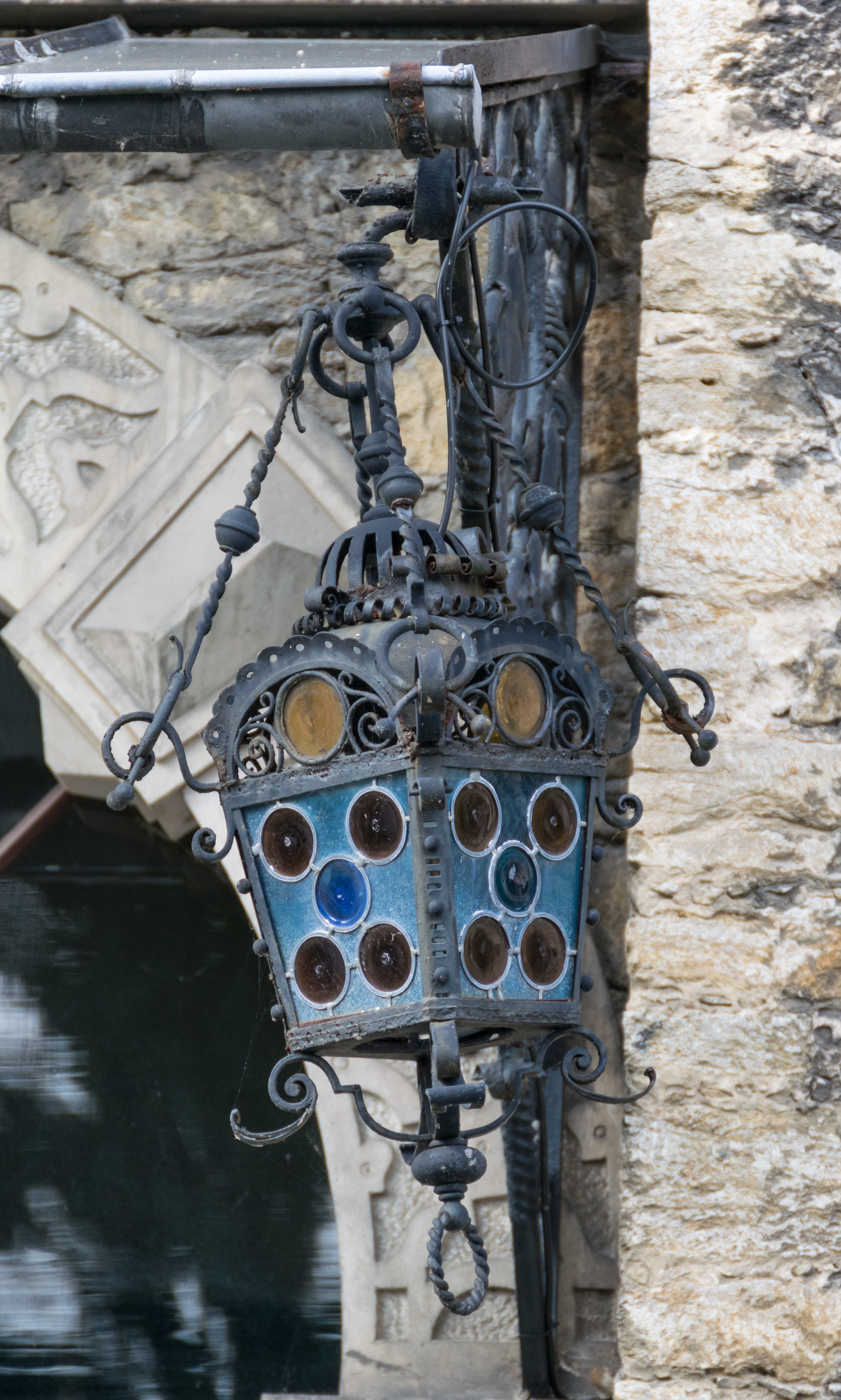 Villa von Donop, 1886; eiserne Laterne